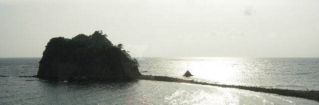 Dōgashima (堂ヶ島) in Shizuoka, Japan.